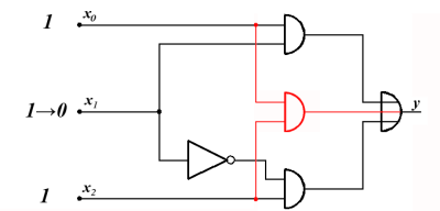 Logische Schaltung mit aufgelöstem Hazard